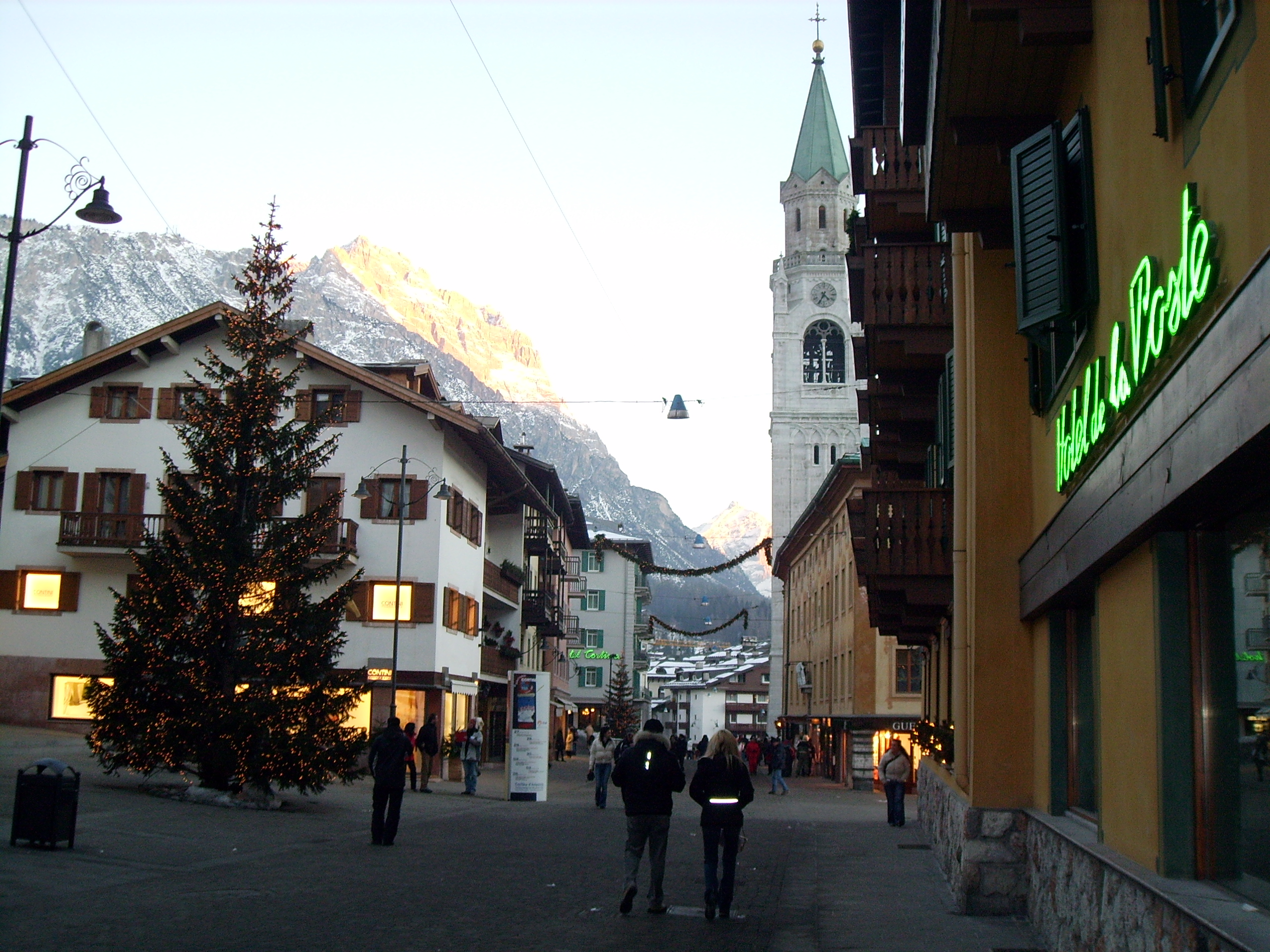 Corso Italia, Cortina d'Ampezzo, Belluno, Veneto, Dolomites, Italy